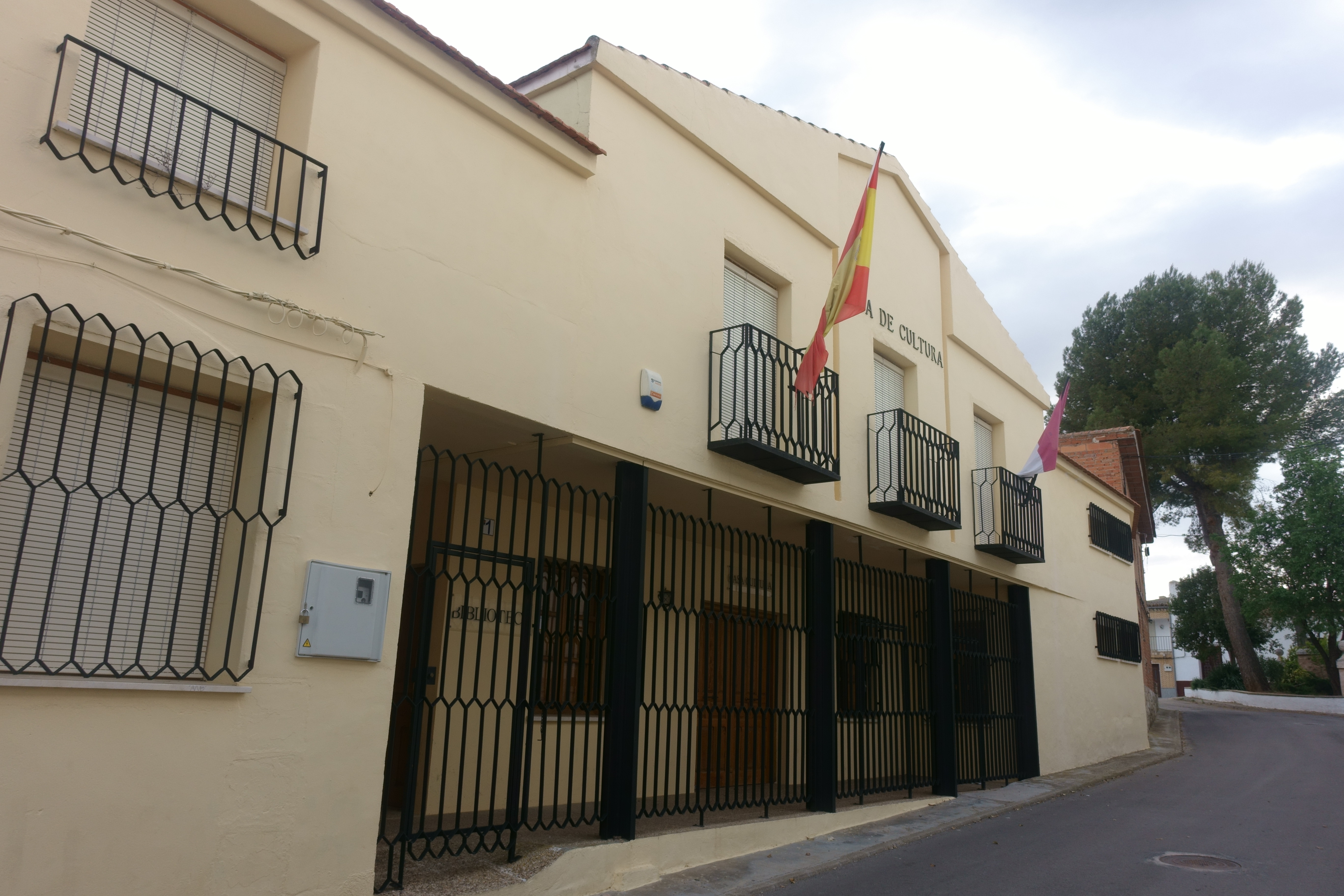 Casa de Cultura en Osa de la Vega (Cuenca, España).